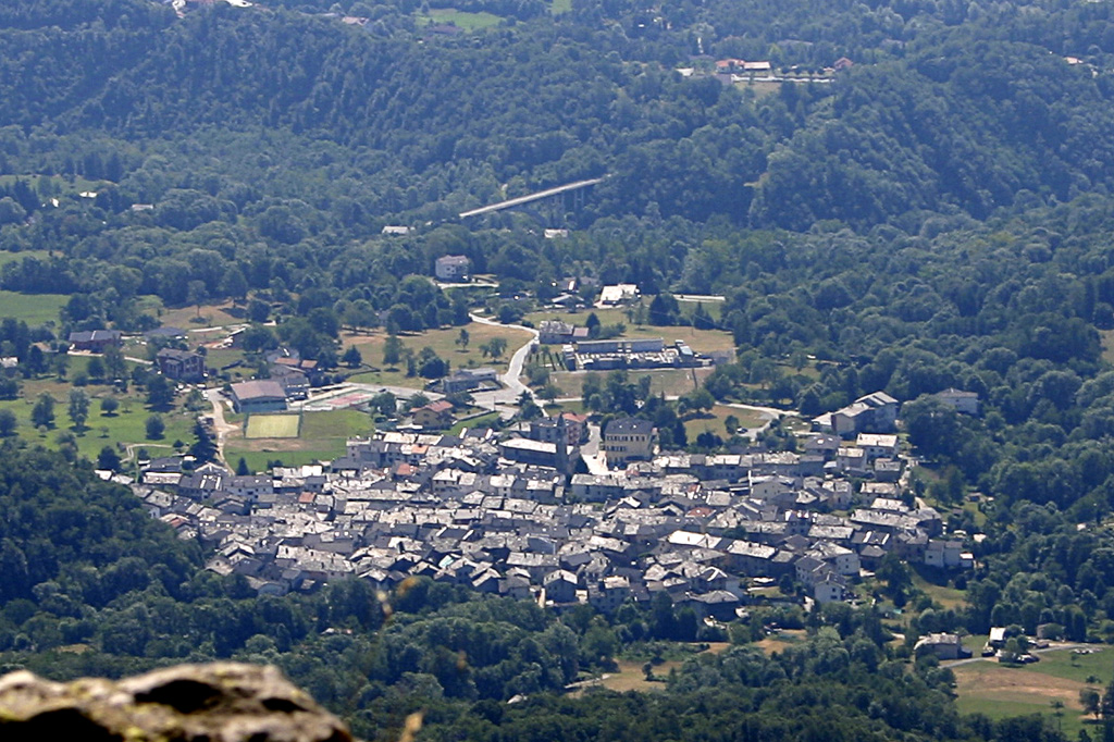 Veduta di Rueglio da Cima Bossola